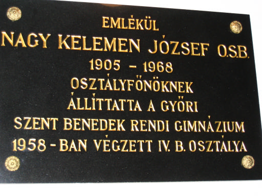 Nagy Kelemen József O.S.B. emléktáblája (Kisszőlős, Veszprém megye)